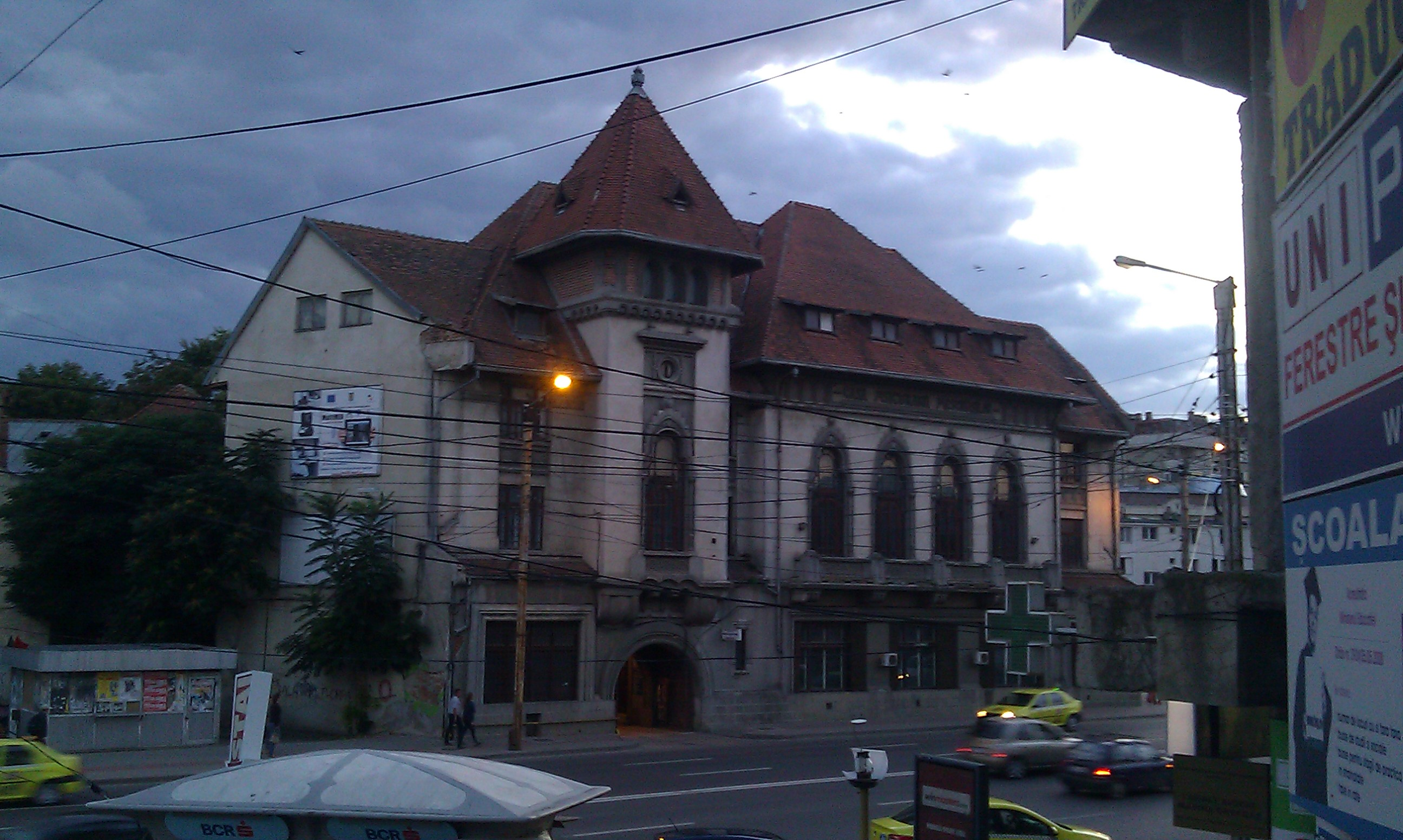 IS-II-m-B-03916 Casa Asigurării Meşteşugarilor, azi policlinică stomatologică